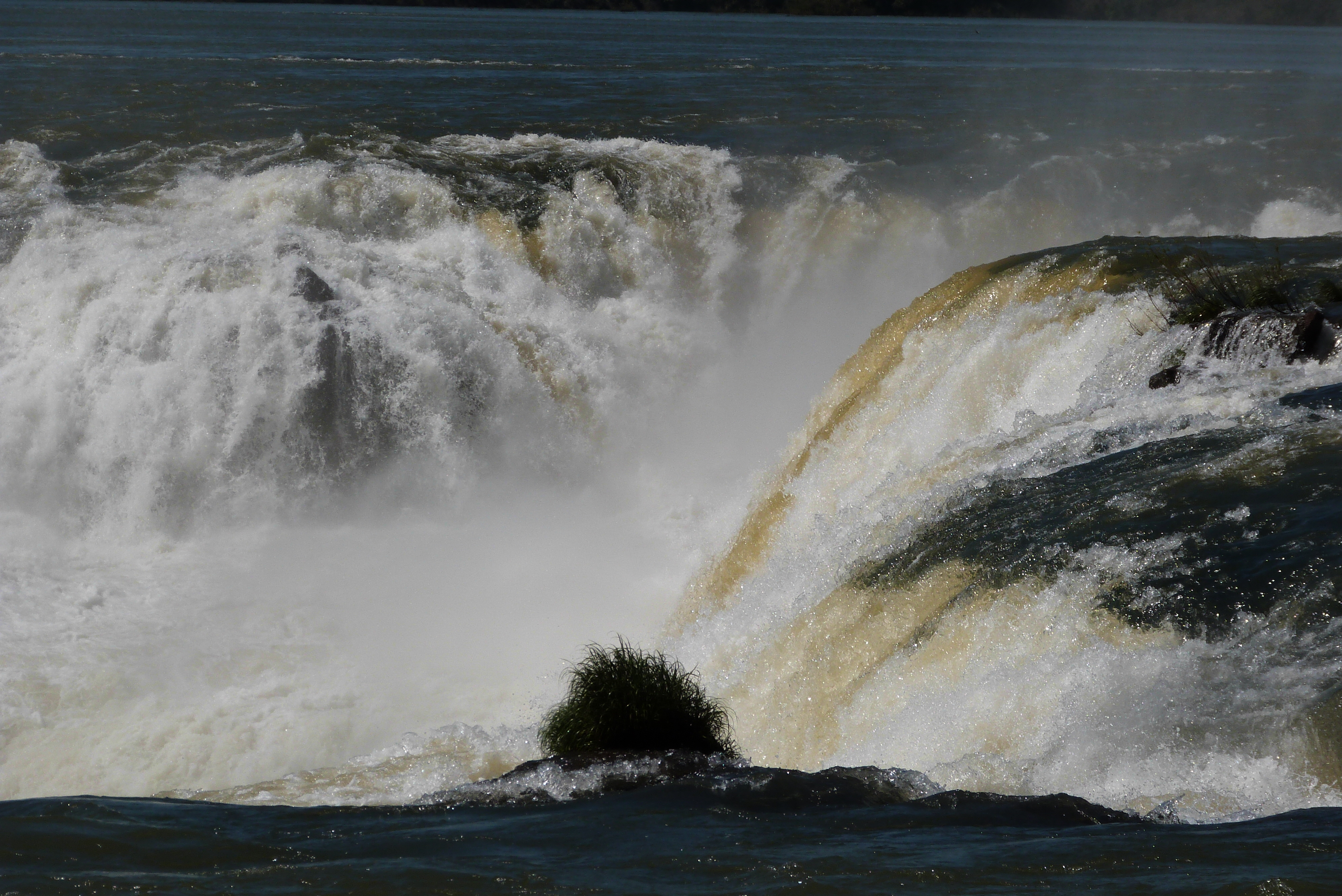 Cataratas del Iguazú, Misiones. MIKEMDP.